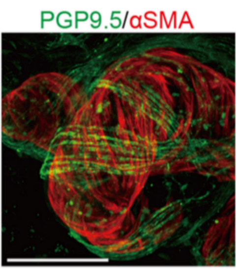 Fig. 5. Imágenes de los vasos sanguíneos de las glándulas sudoríparas y las fibras nerviosas. (D) Detección de inmunofluorescencia de PGP9.5 y αSMA en glándulas sudoríparas. Las líneas verdes indican fibras nerviosas que envuelven las porciones secretoras positivas para αSMA (en rojo). Los núcleos (azul) se contratiñeron con Hoechst 33342. Barra de escala: 50 μm.